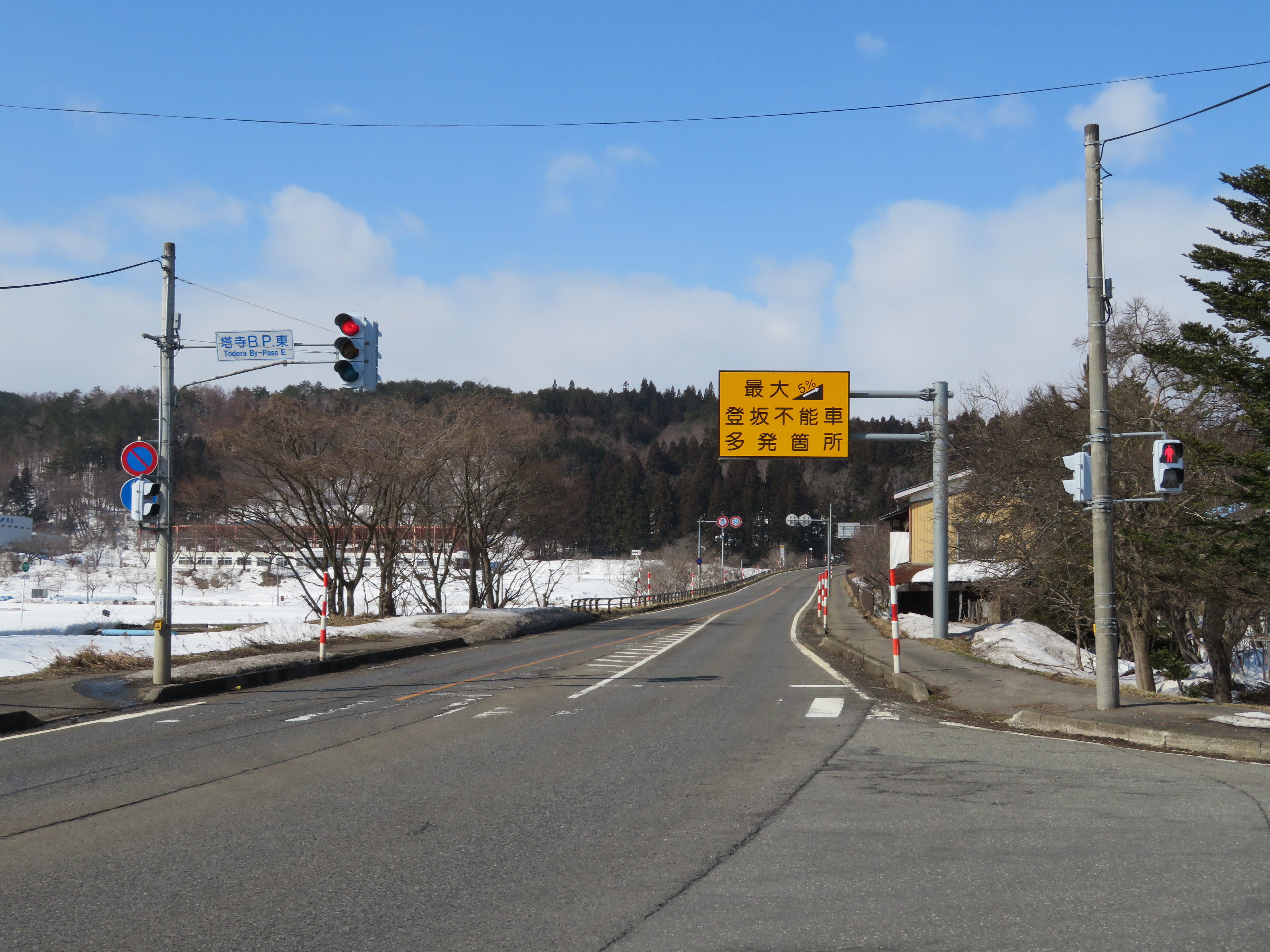 国道49号線塔寺バイパス 塔寺バイパス東交差点付近（西会津方面を撮影）